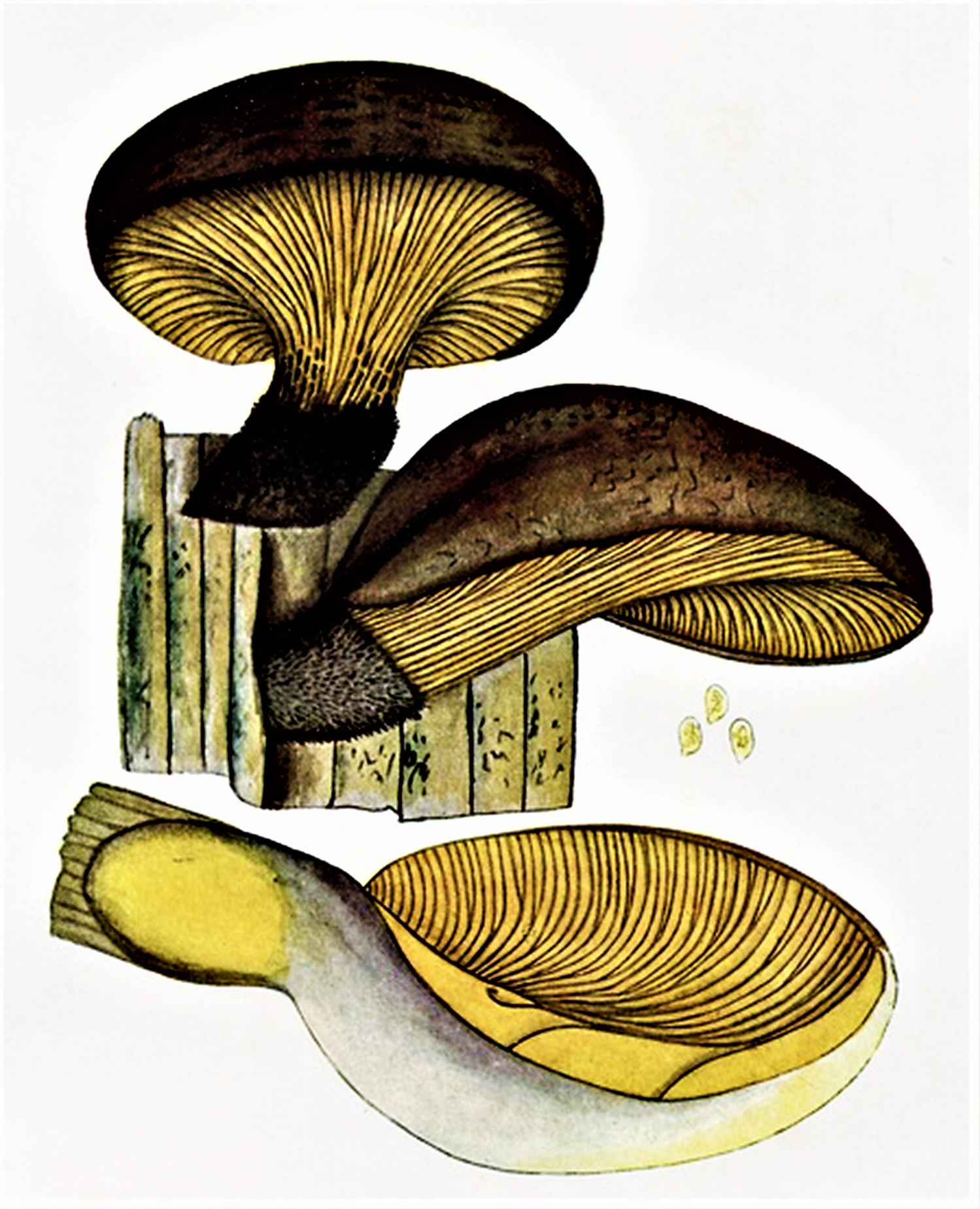 Giacomo Bresadola: Paxillus atro-tomentosus (Batsch, 1783) Fr. (1838), heute Tapinella atrotomentosa (Batsch) Šutara (1992)